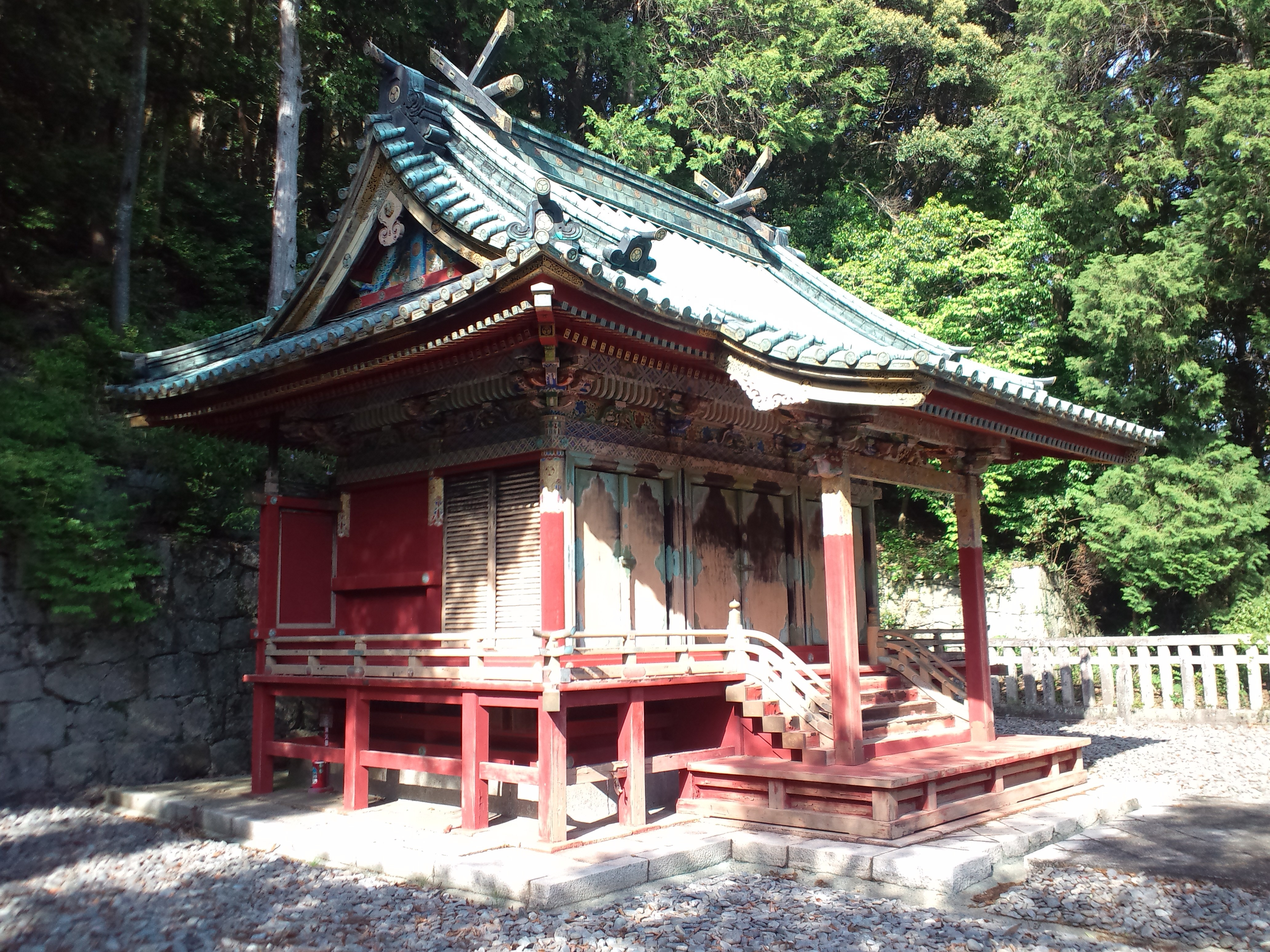 滝山東照宮 本殿